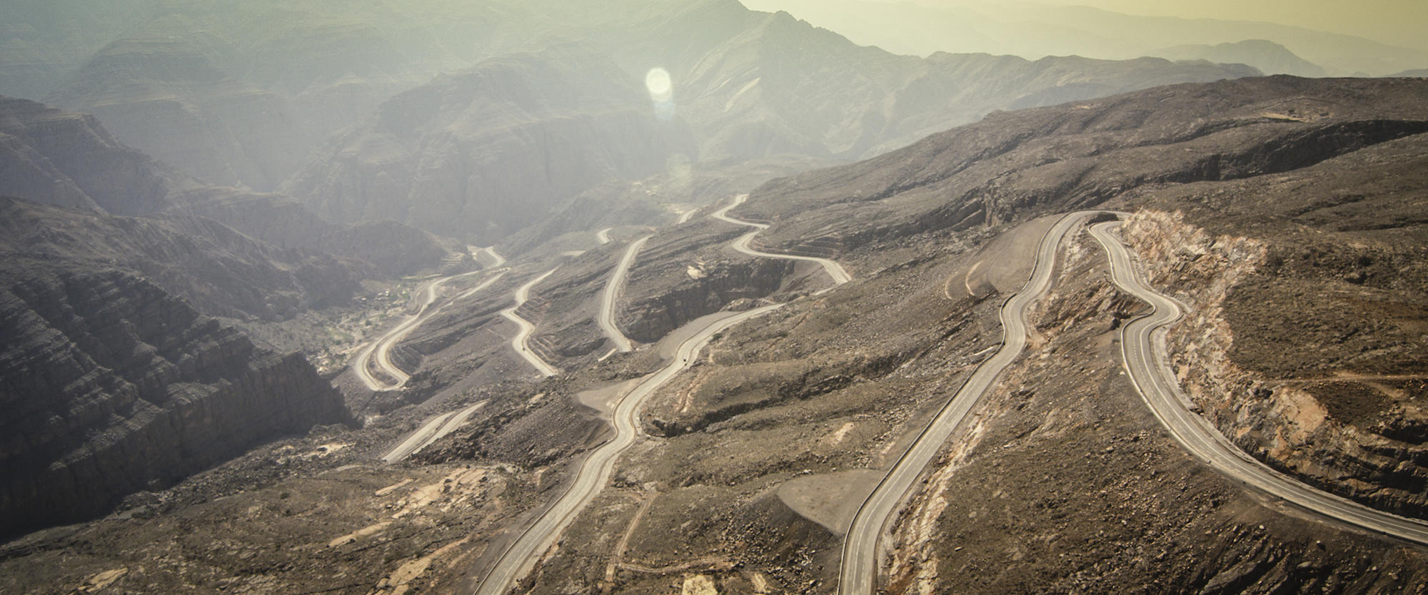 Jaguar F-TYPE Tackles Exhilarating Jebel Jais Hairpins